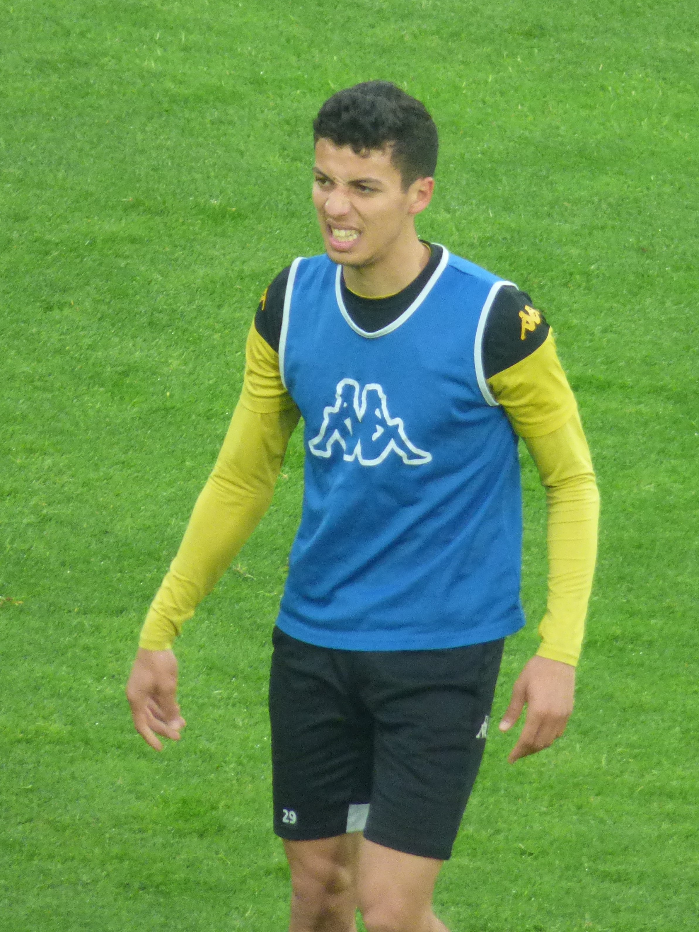 Amine Talal avant le match RC Lens / US Orléans, le 17 mai 2019, comptant pour la 38ème journée du championnat de France de football de Ligue 2 2018-2019, au Stade Bollaert-Delelis.